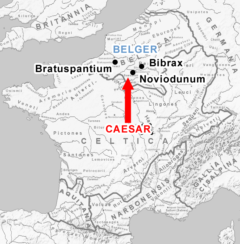 De bello gallico - 2. Buch. Krieg gegen die Belger.